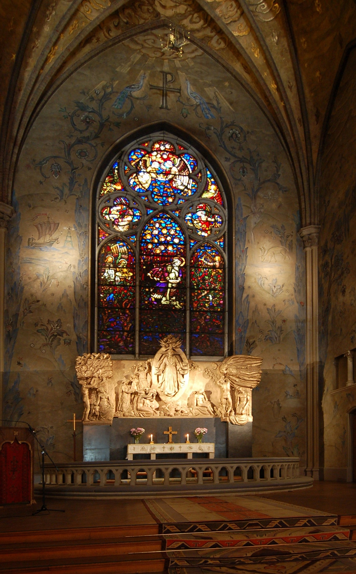 Altare, alrarring m.m. Oscarskyrkan, Stockholm.